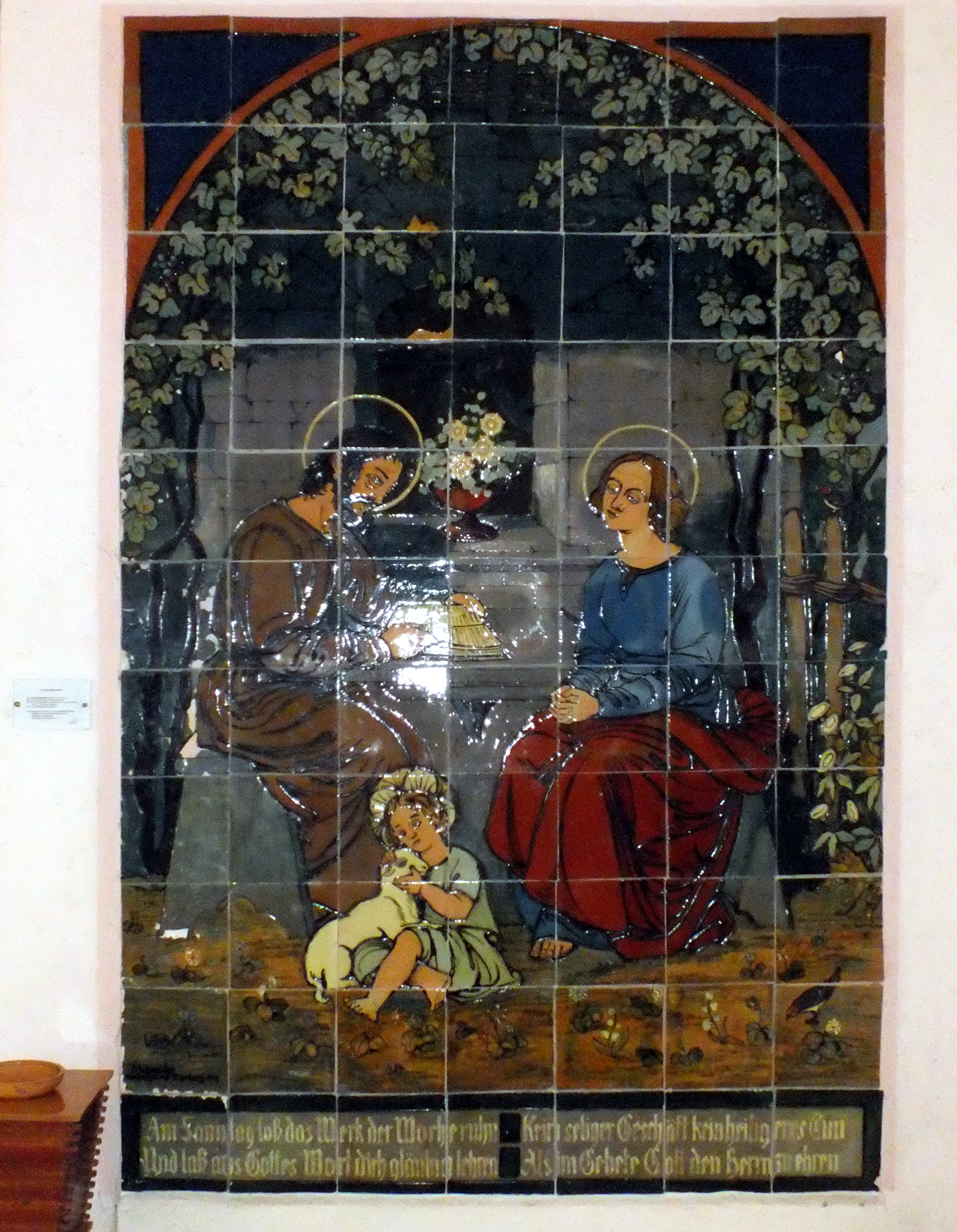 Nicolaikirche Grünhain